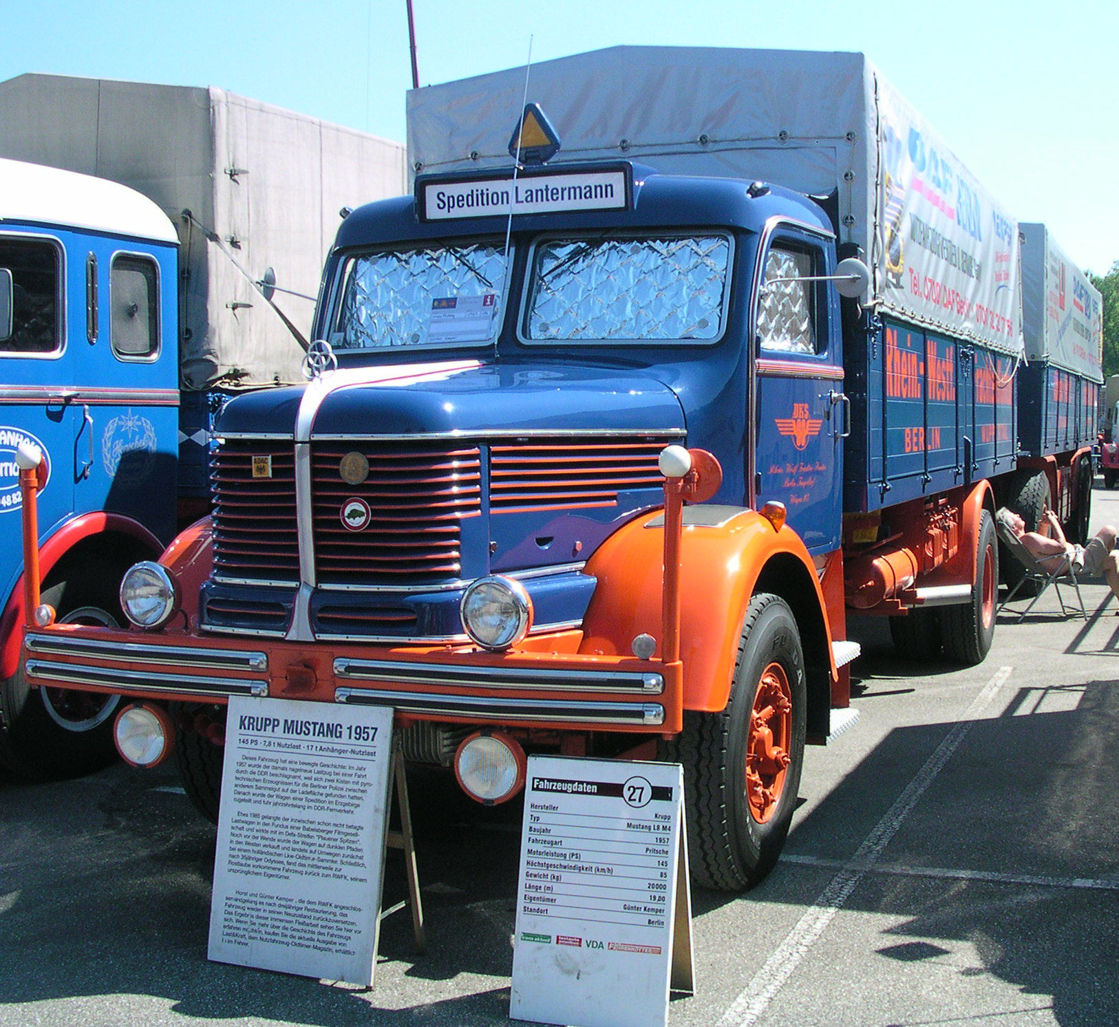 Wörth am Rhein, Oldtimer-Treffen bei Daimler-Chrysler Krupp Mustang L8 M4, Baujahr 1957, 20 t, 107 Kw (145 PS). 7,8 Tonnen Nutzlast, 17 Tonnen Anhängelast